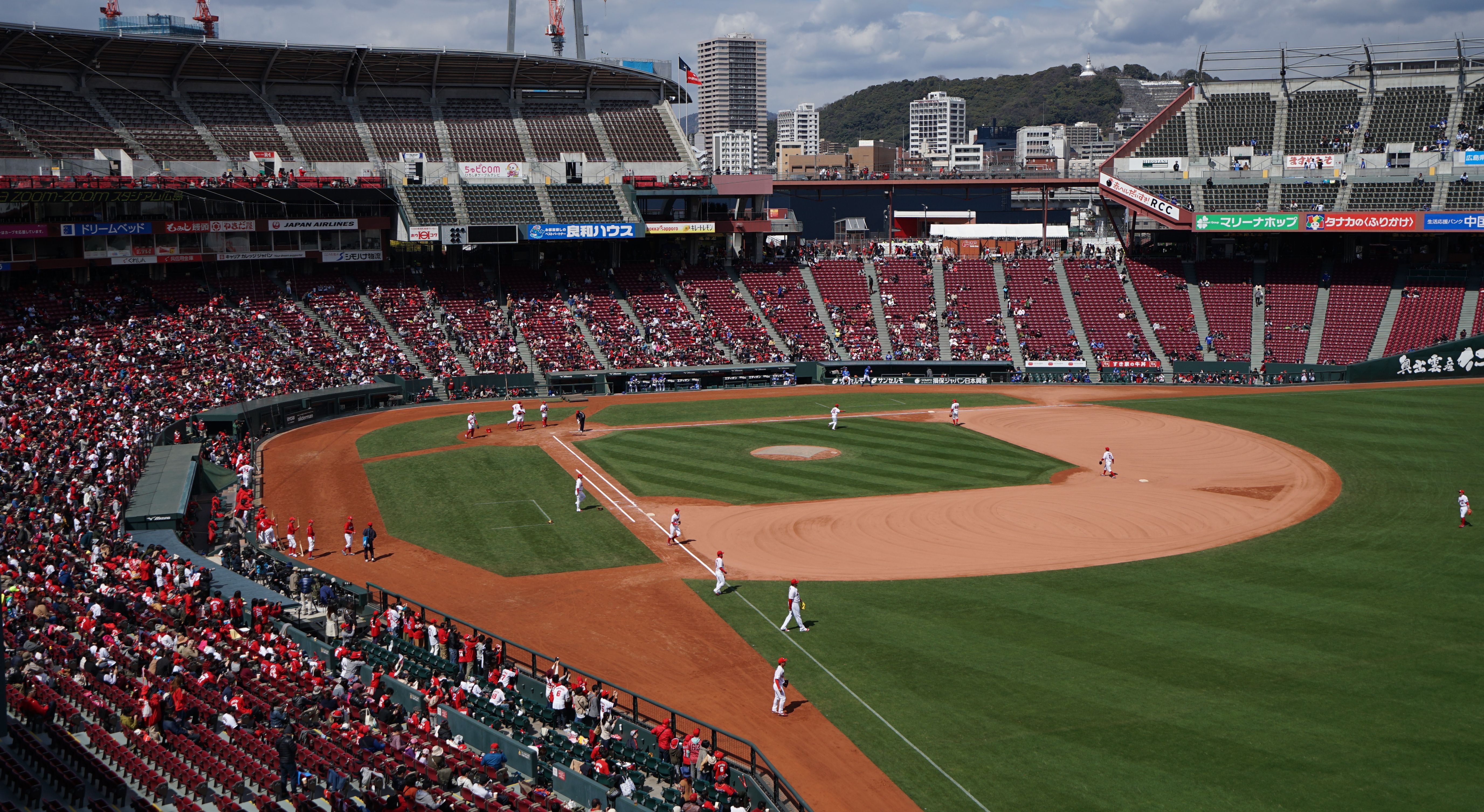 2016年3月12日、広島市民球場（マツダスタジアム）にて本人撮影